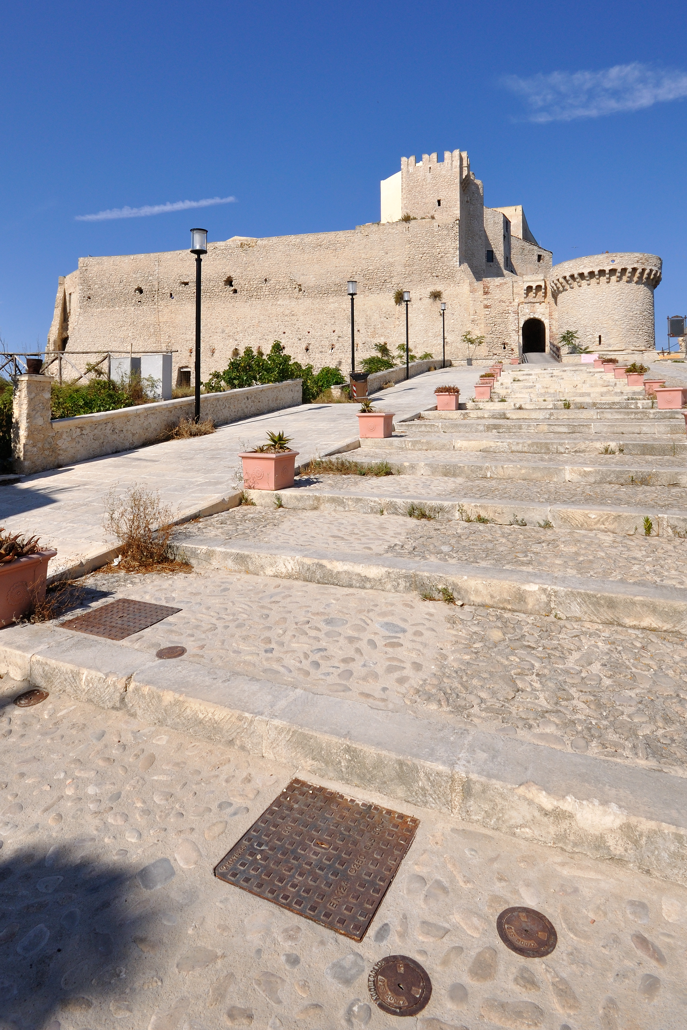 Santuario di Santa Maria a Mare - Isola di San Nicola, Isole Tremiti, Foggia, Italia